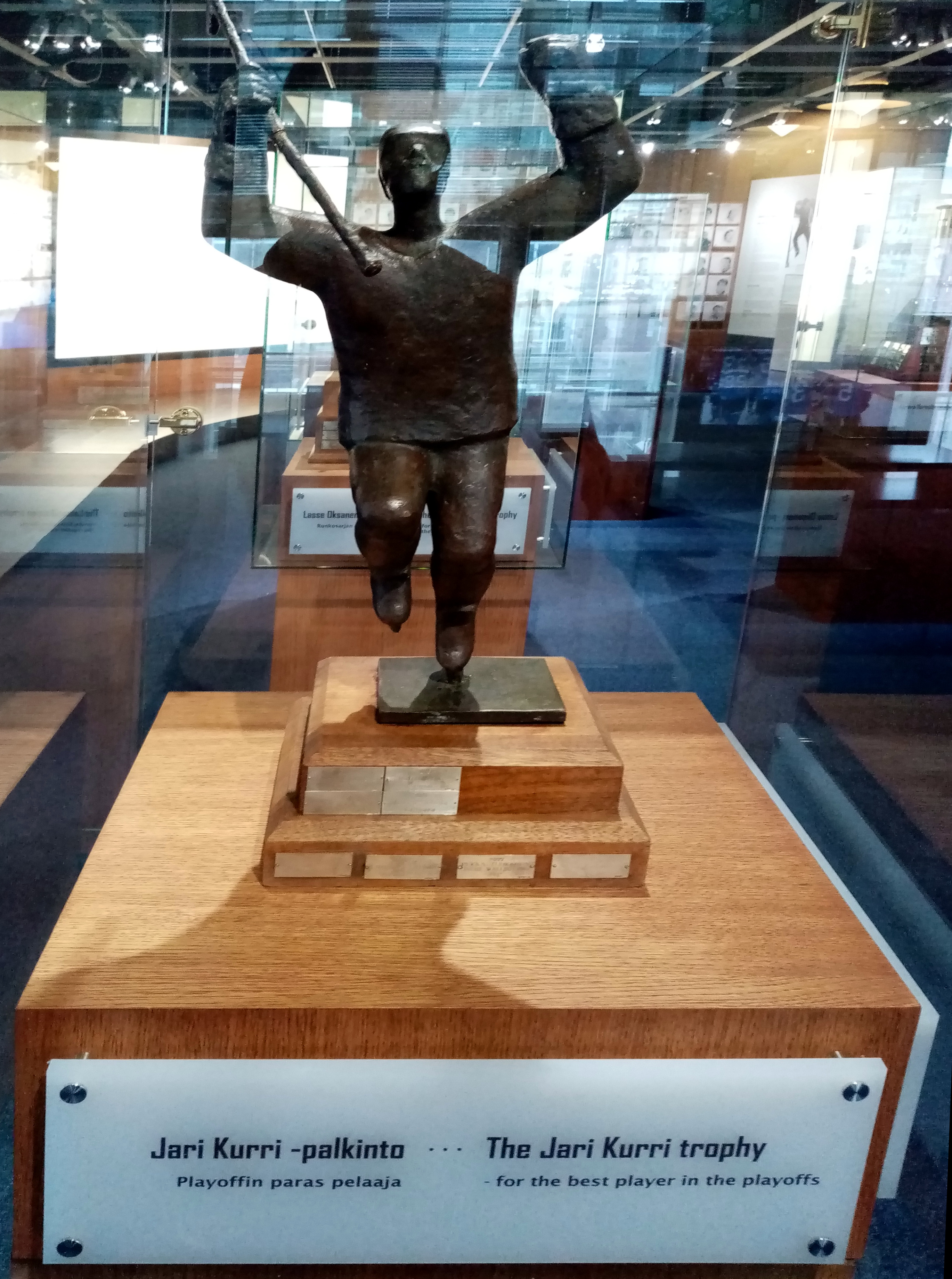 O Trofeo Jari Kurri no Museo do Hóckey de Finlandia.